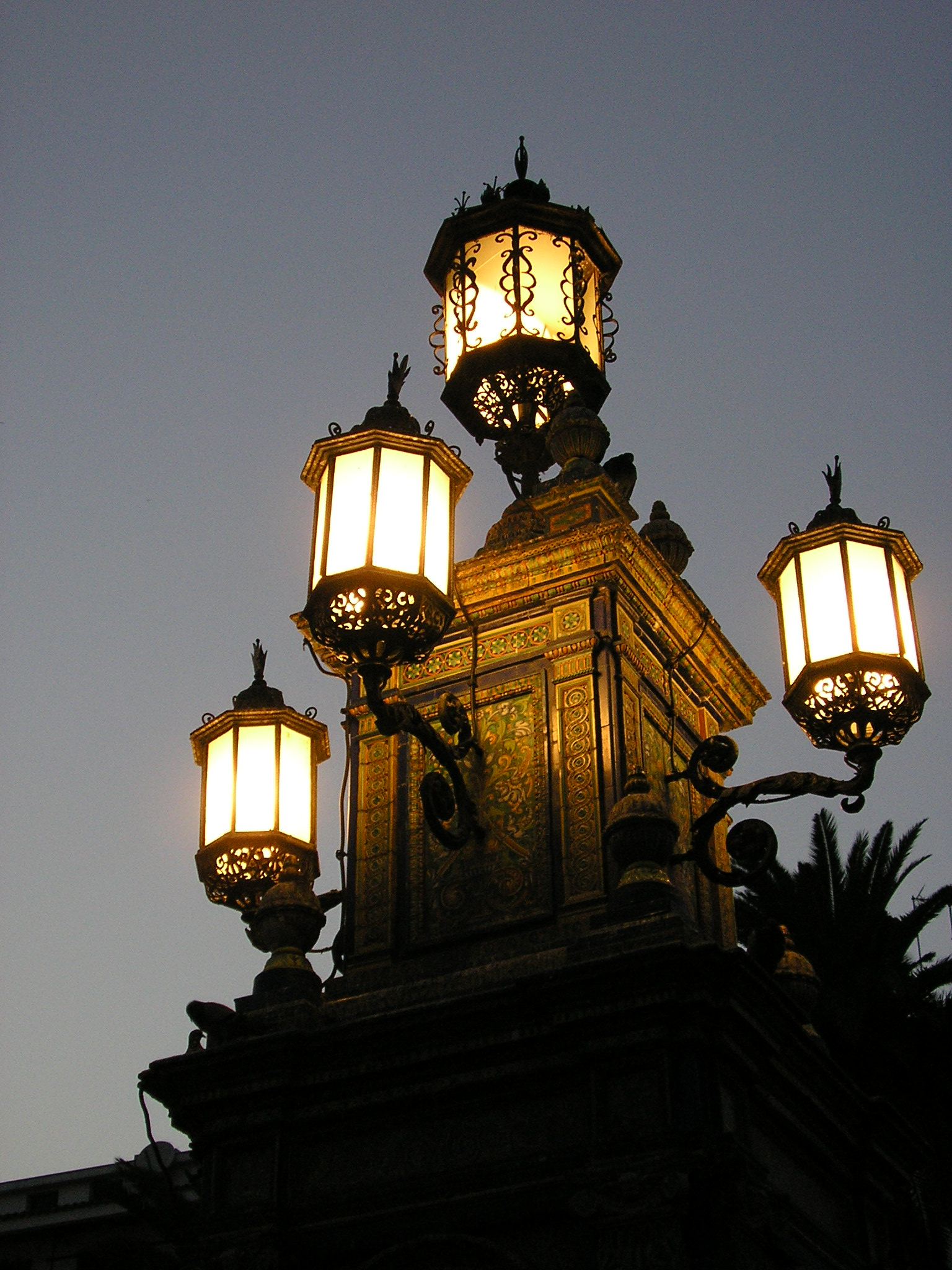 Fuente de la Plaza Alta en la localidad andaluza de Algeciras (España).